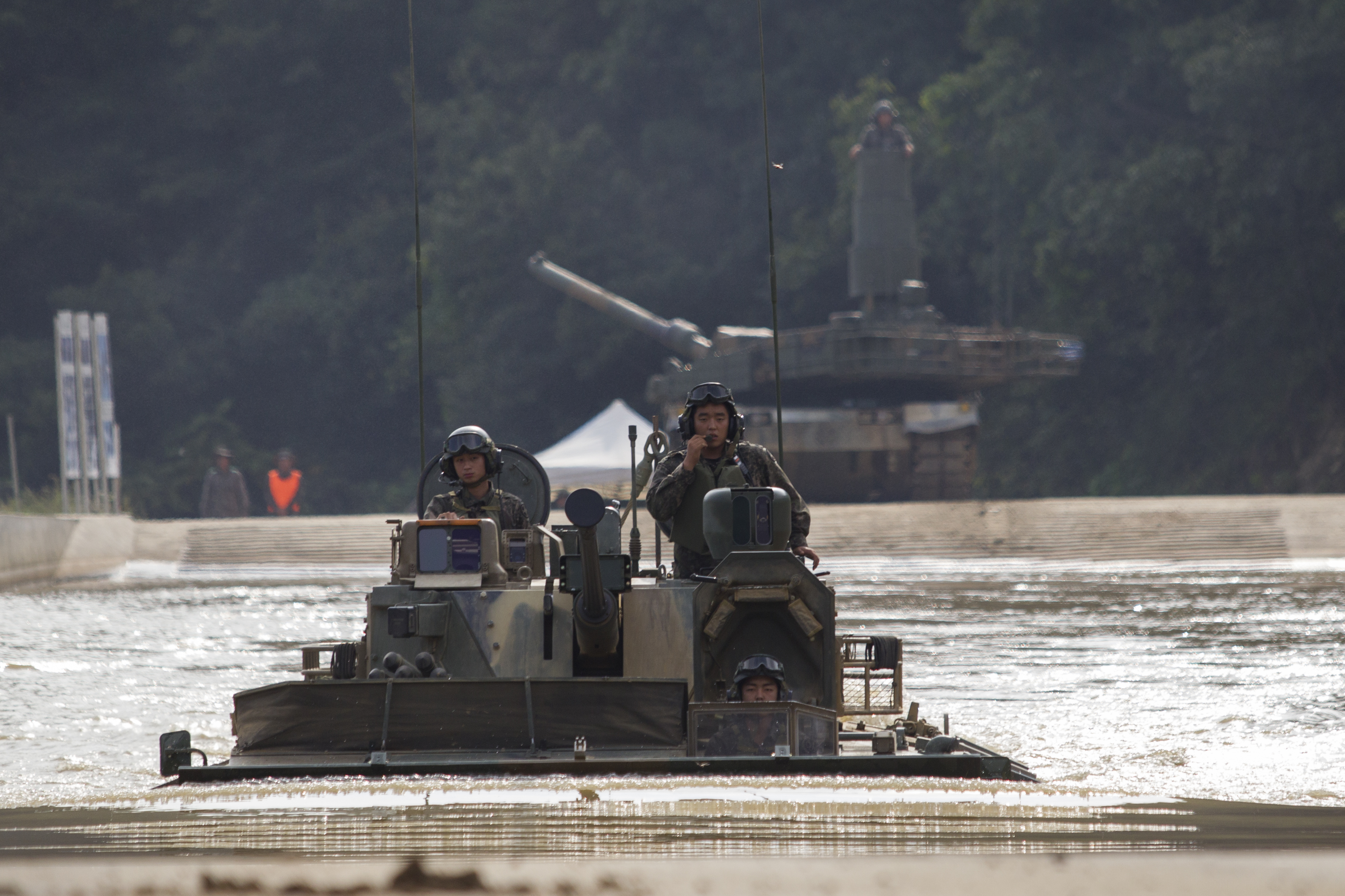 사진 - 정승익 육군 블로그 사진작가